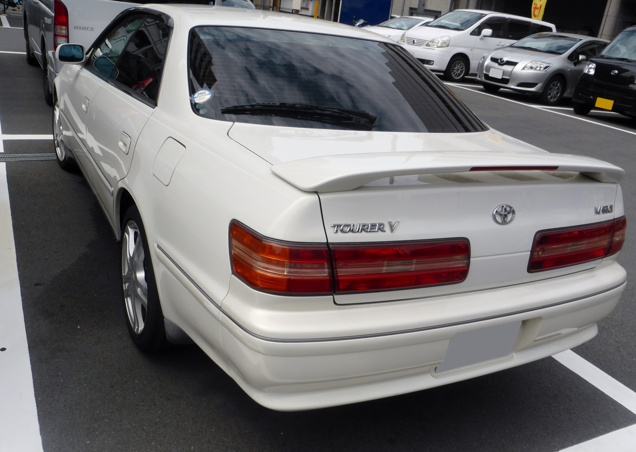 X100型トヨタ・マークIIツアラーVをリアから撮影。